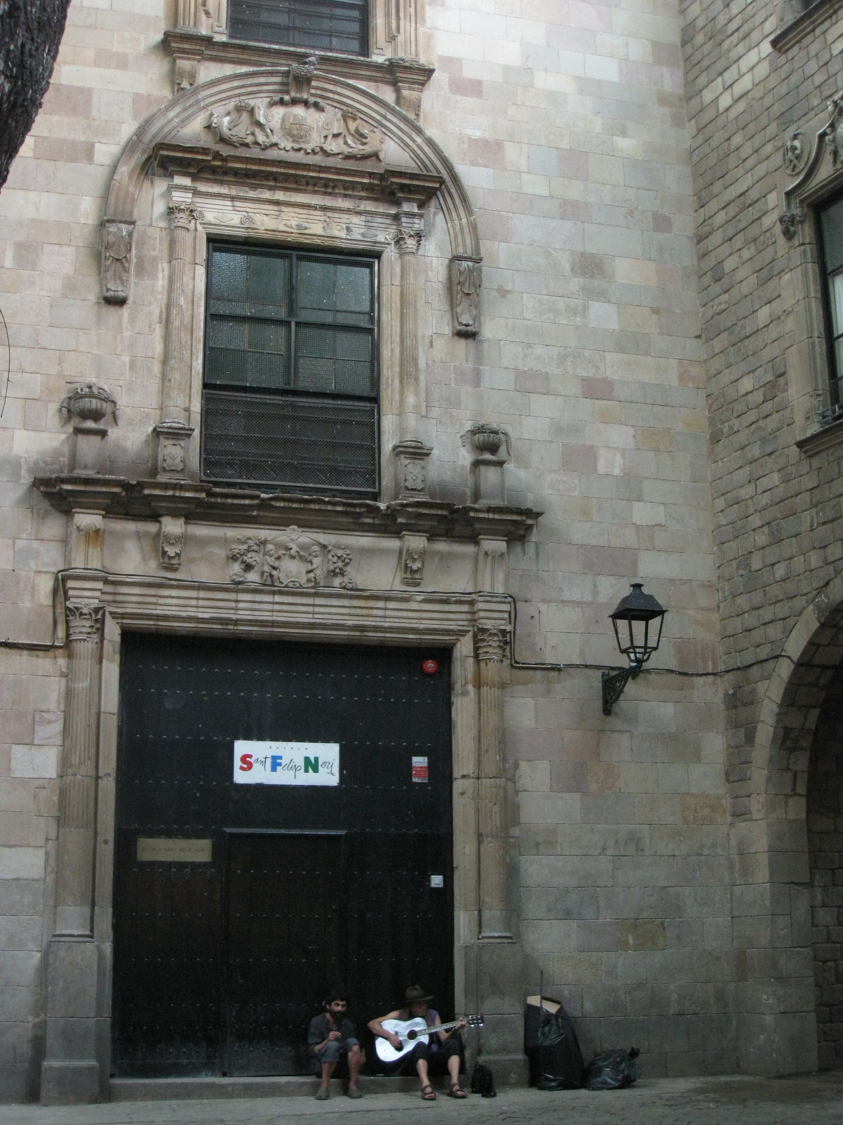 Casa del Gremi dels Calderers, a la plaça de Sant Felip Neri, al barri Gòtic de Barcelona. La façana d'aquest edifici fou traslladada de l'edifici original al carrer de la Bòria, del segle XVI, quan fou enderrocat per obrir la Via Laietana. Allotja l'escola Sant Felip Neri.